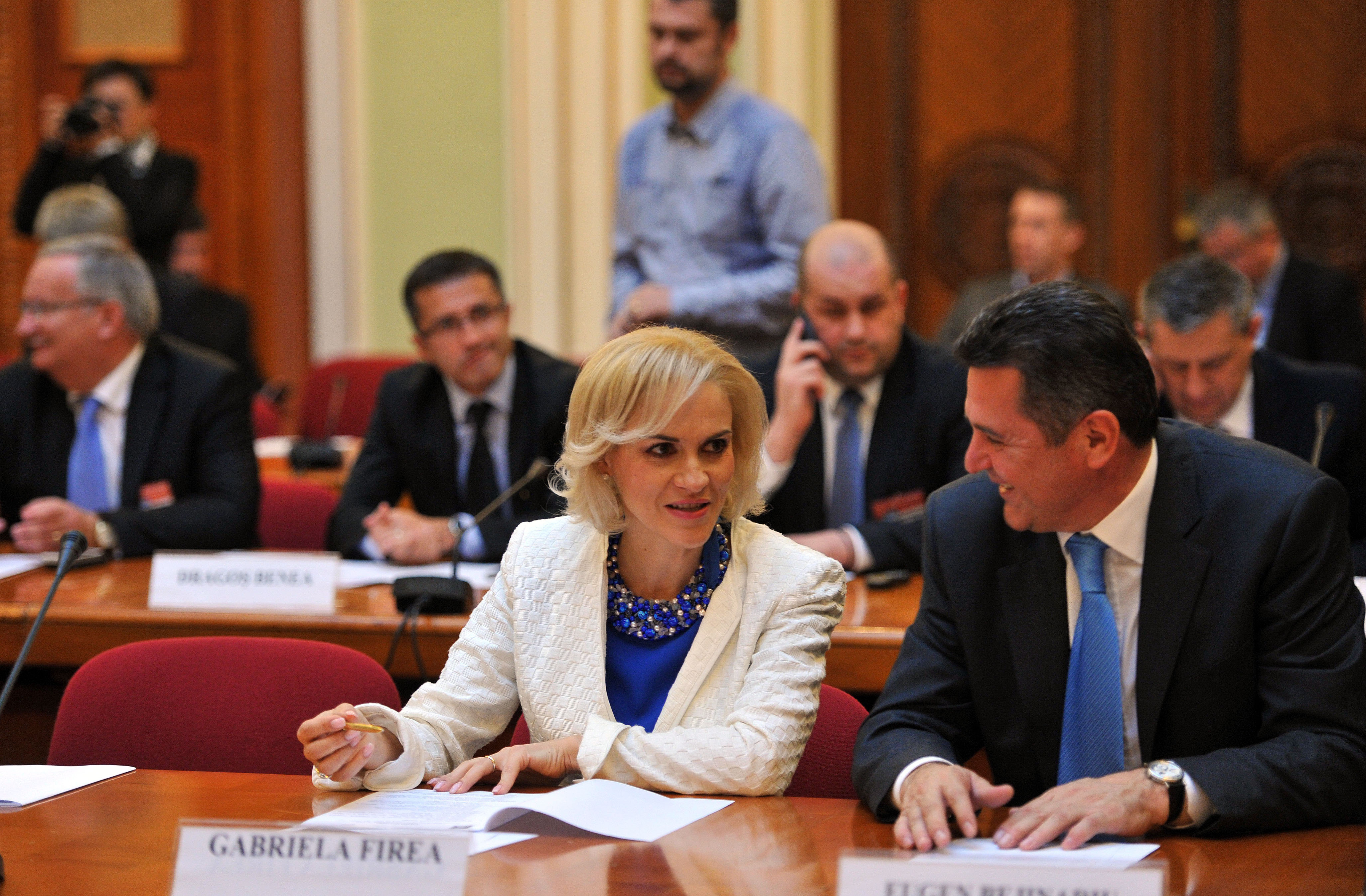 Gabriela Firea si Eugen Bejinariu la CExN PSD, Palatul Parlamentului